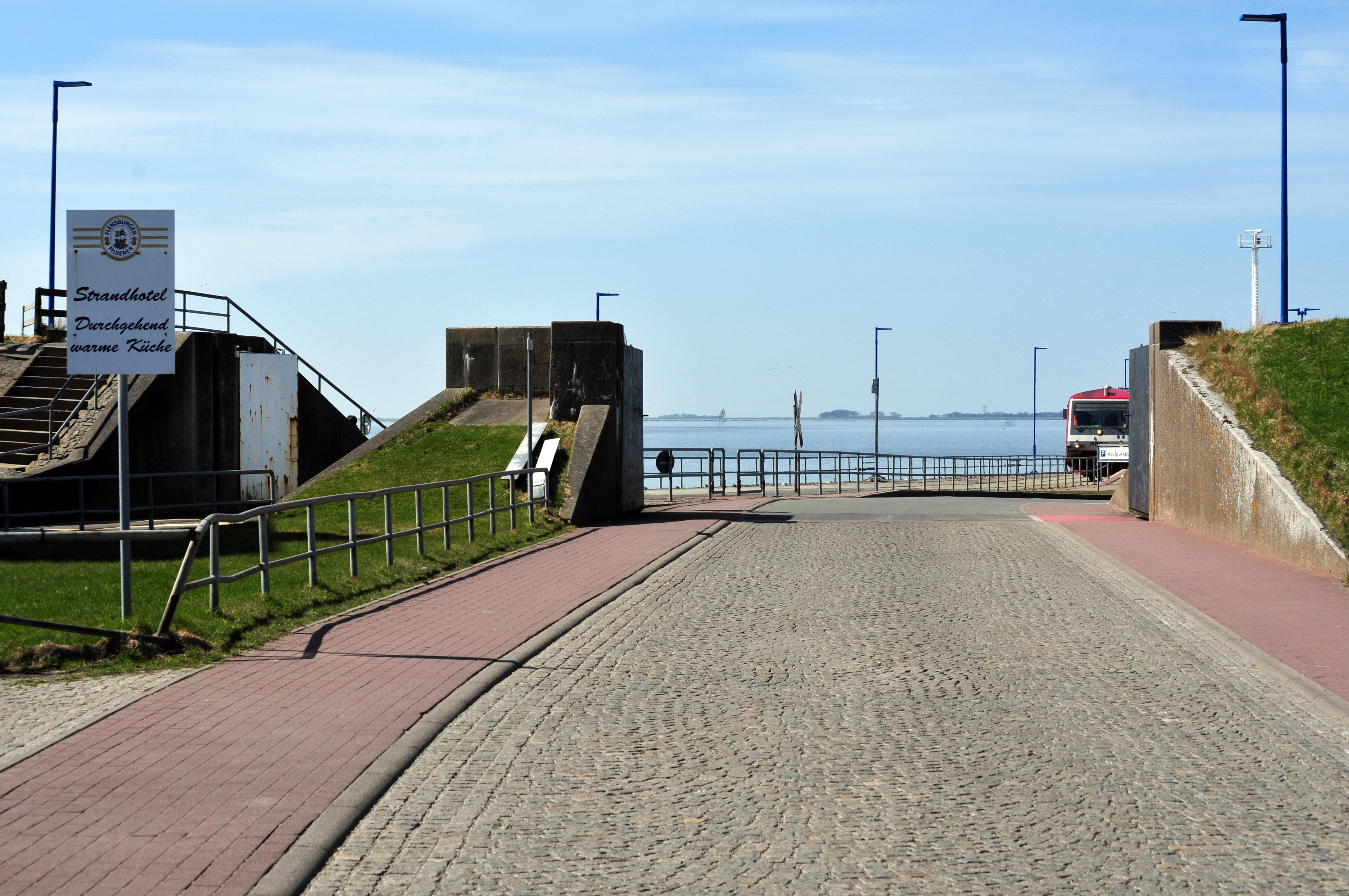 Stöpe (da: Støpe) in Dagebüll